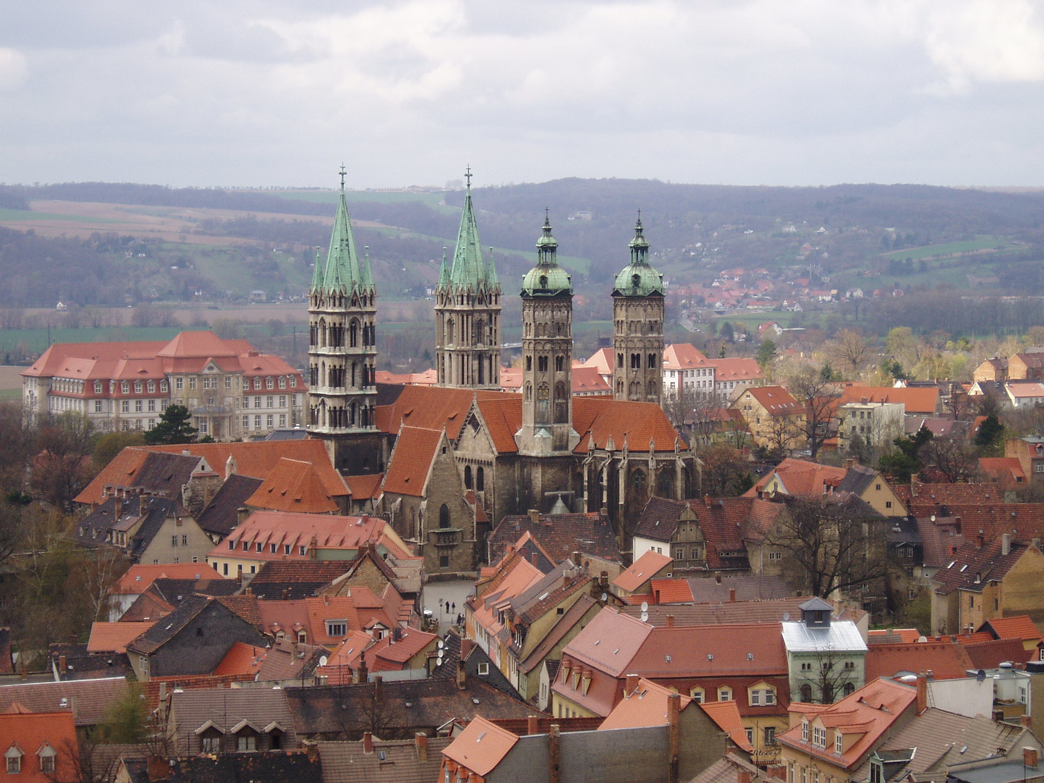 Naumburg (Saale), Dom; aufgenommen vom Wenzelsturm